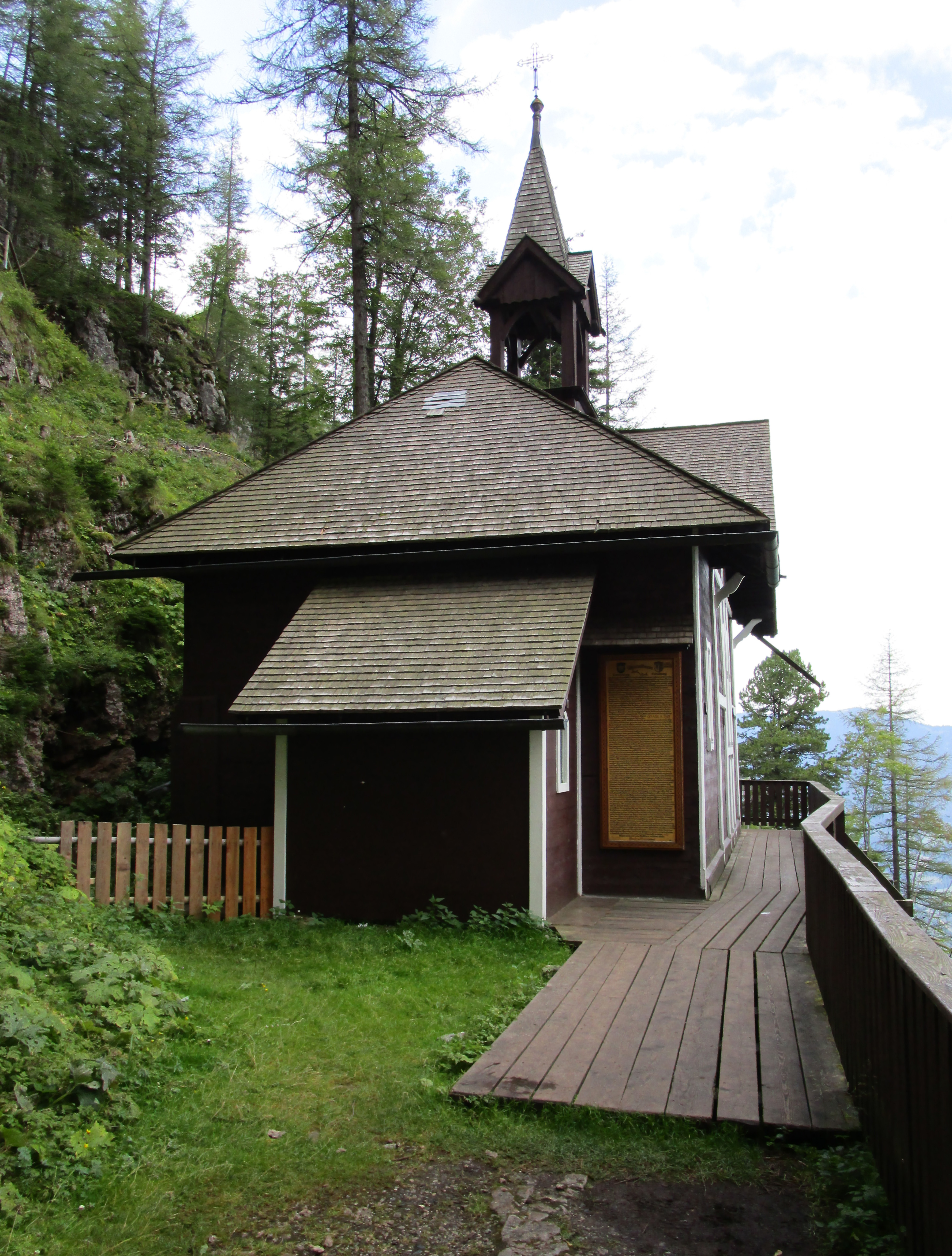 Rückseite der Schüsserlbrunnkapelle am Hochlantsch